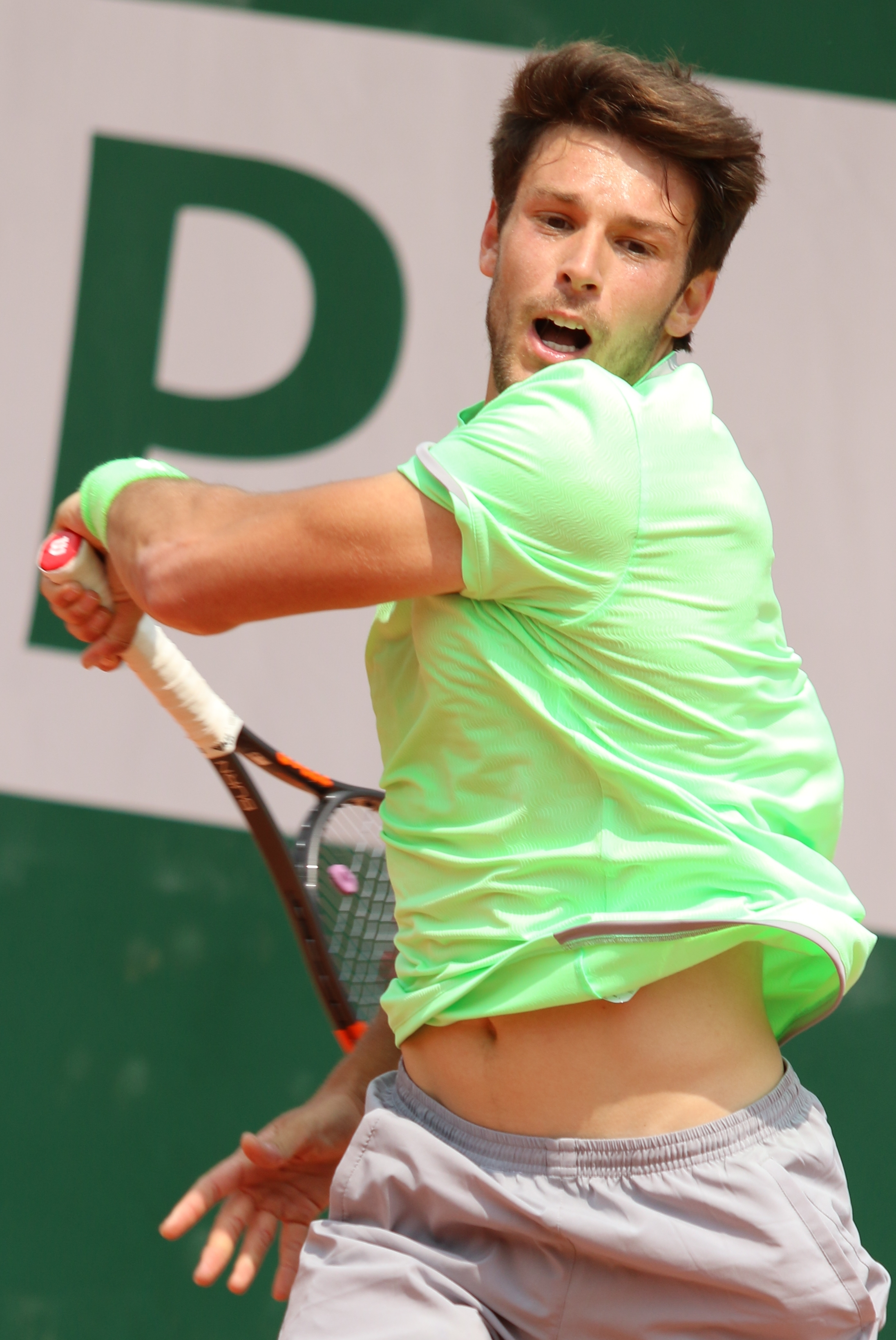 Quinzi RGQ19 (32)